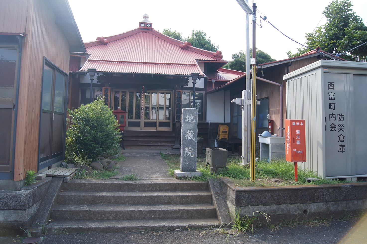 日限地蔵 (藤沢市)全景